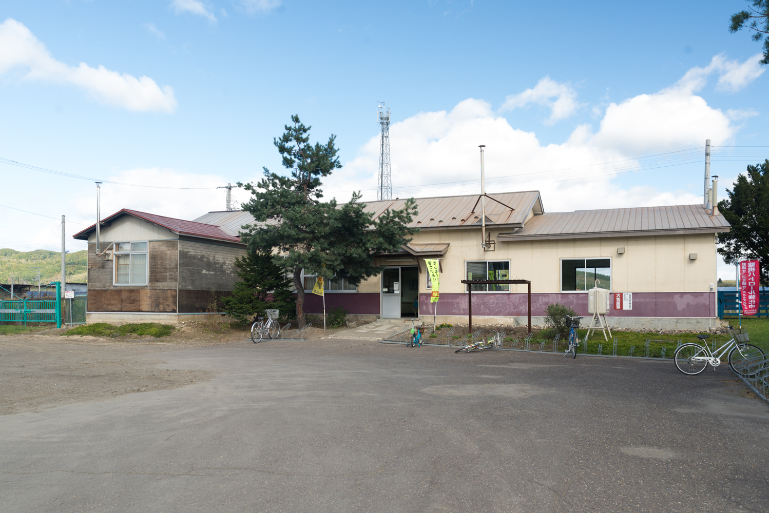 北海道旅客鉄道株式会社石北本線東相内駅駅舎